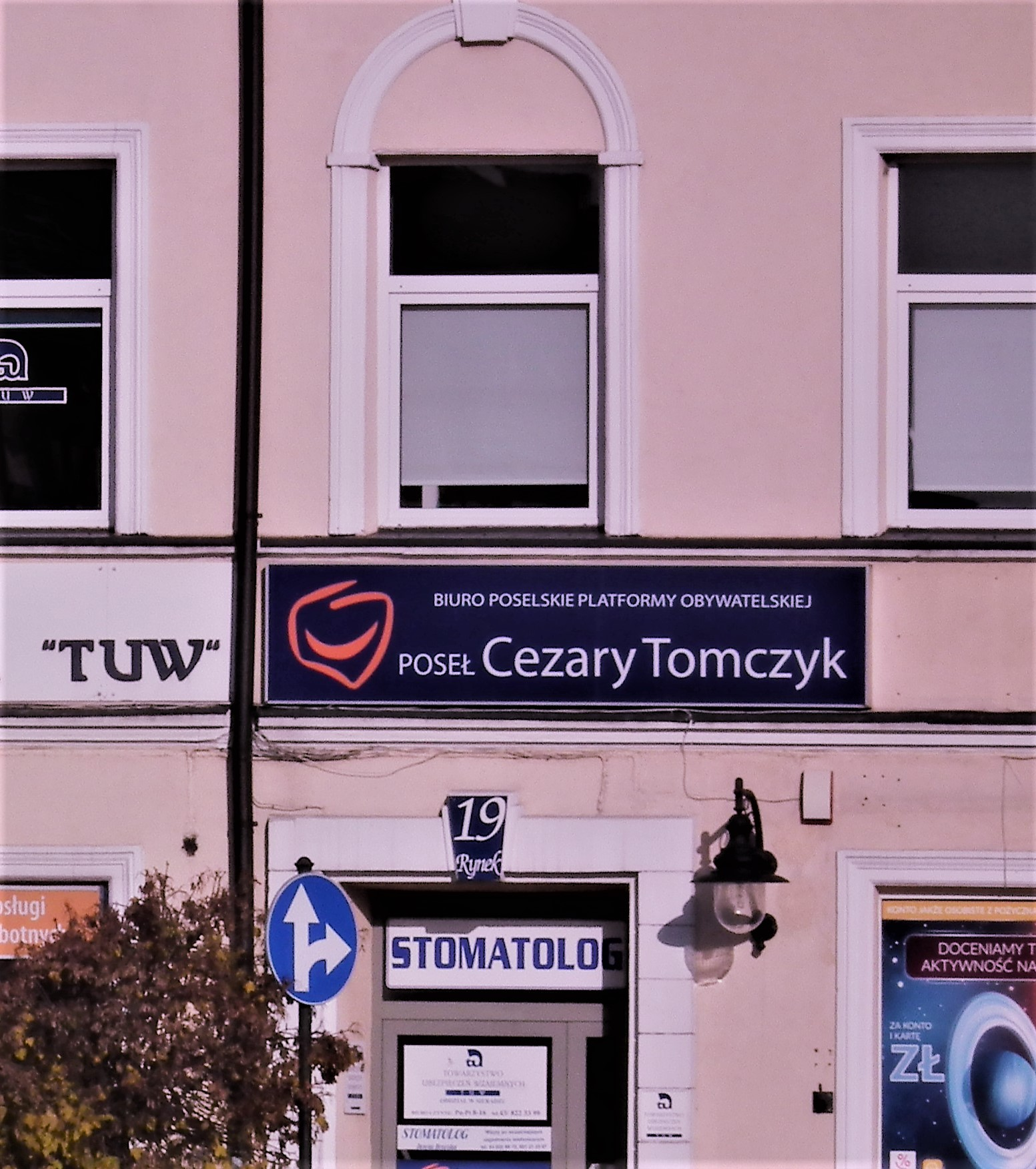 Biuro posła Cezarego Tomczyka w Sieradzu na Rynku.